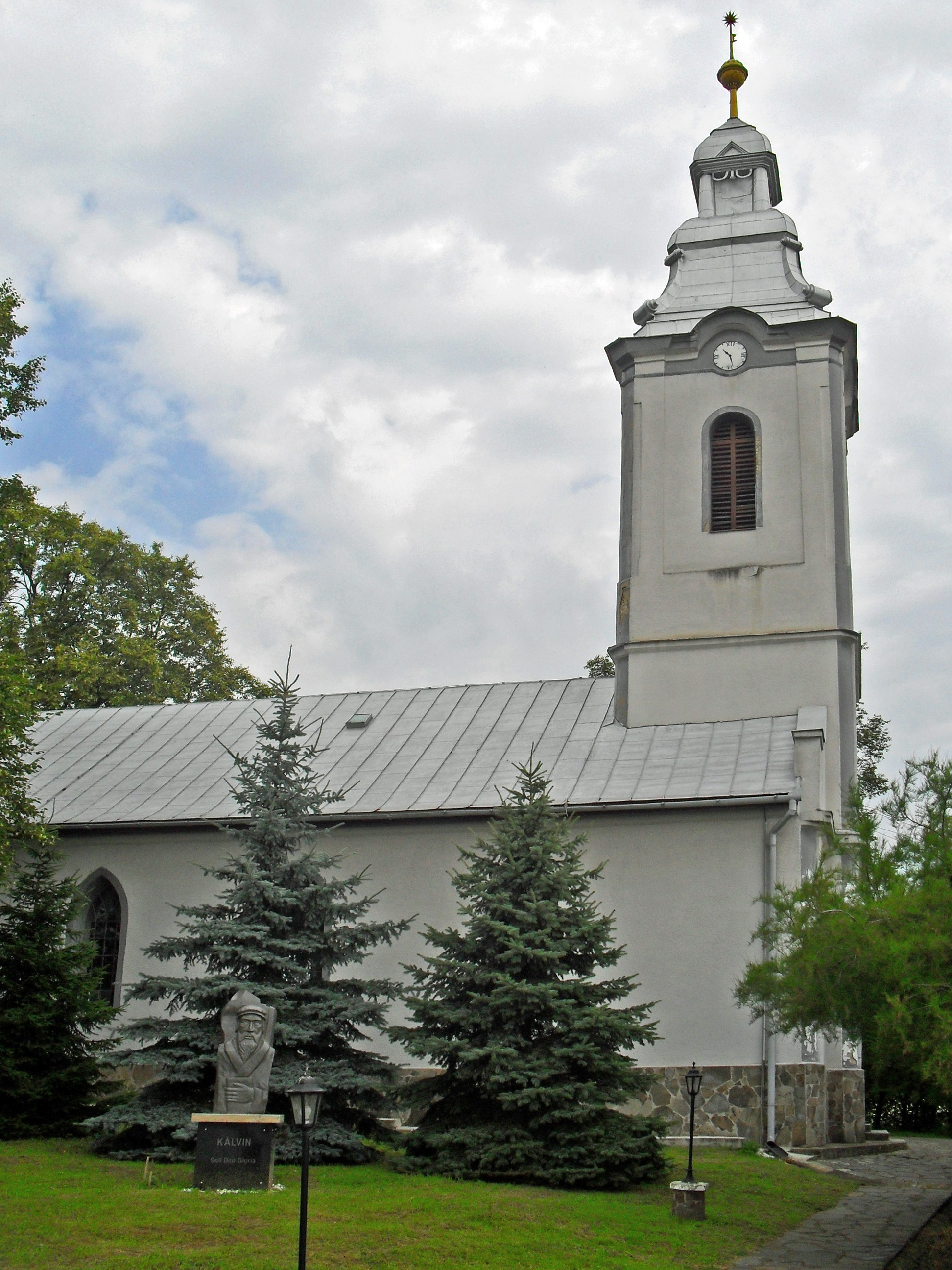 Királyhelmec - református templom